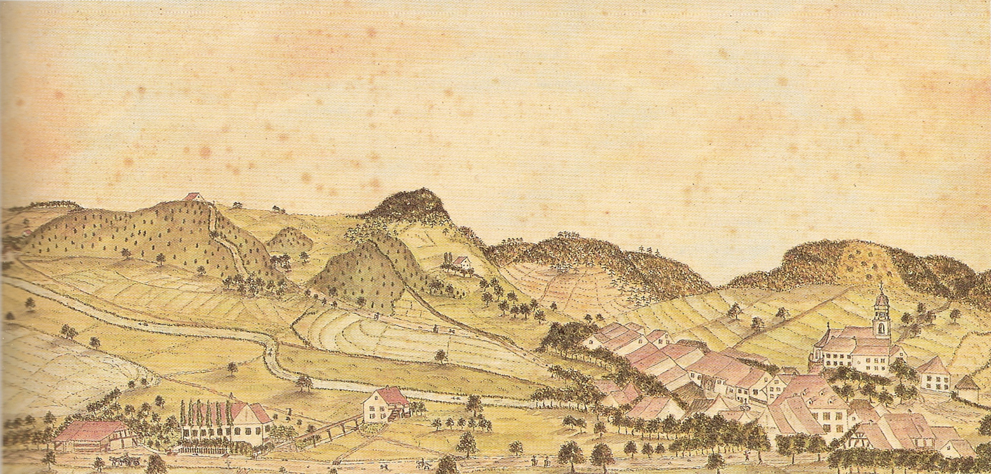 Ansicht von Frick, gut erkennbar der grossflächig gerodete Wald